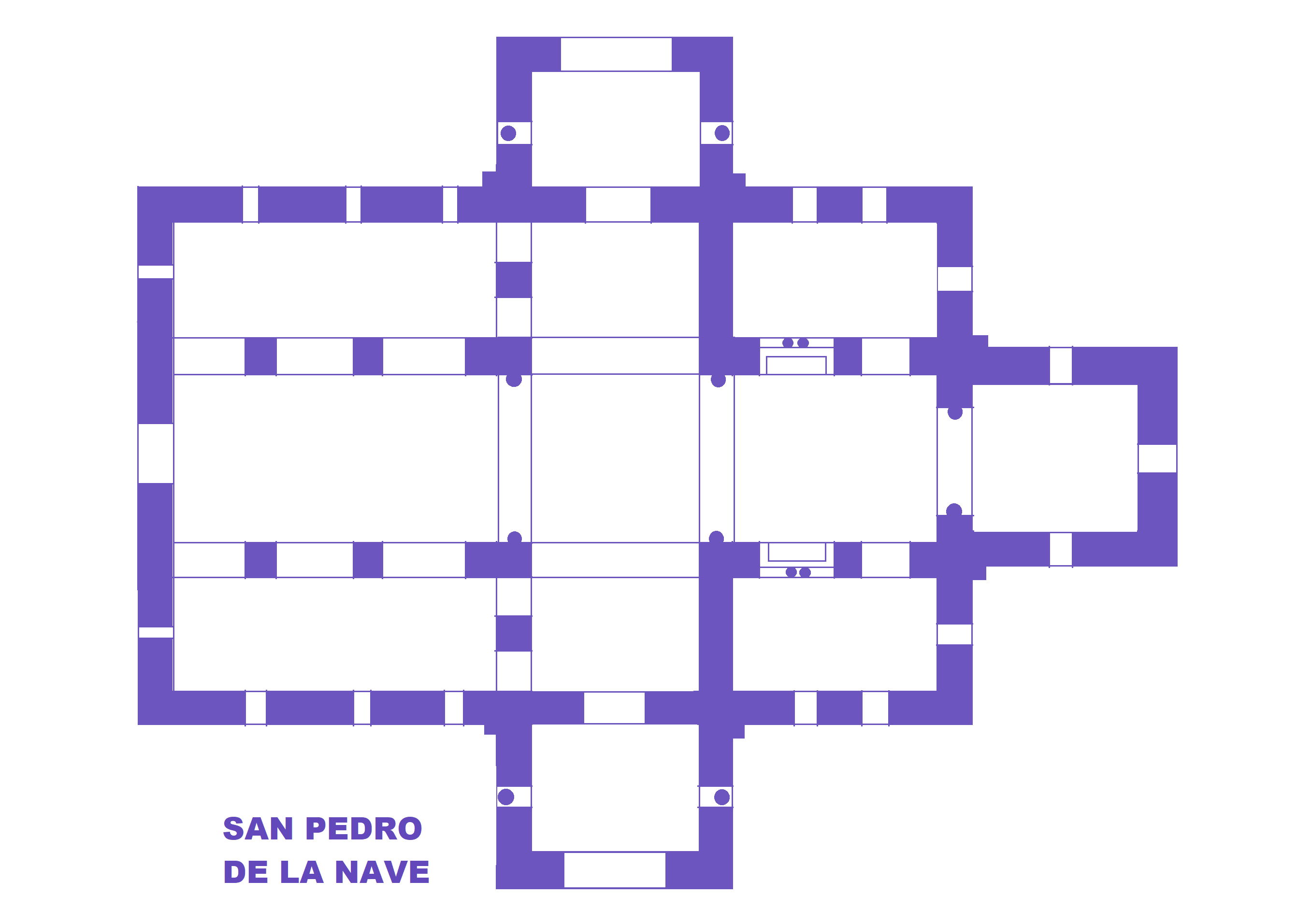 Eglise San Pedro de la Nave, Espagne, Plan